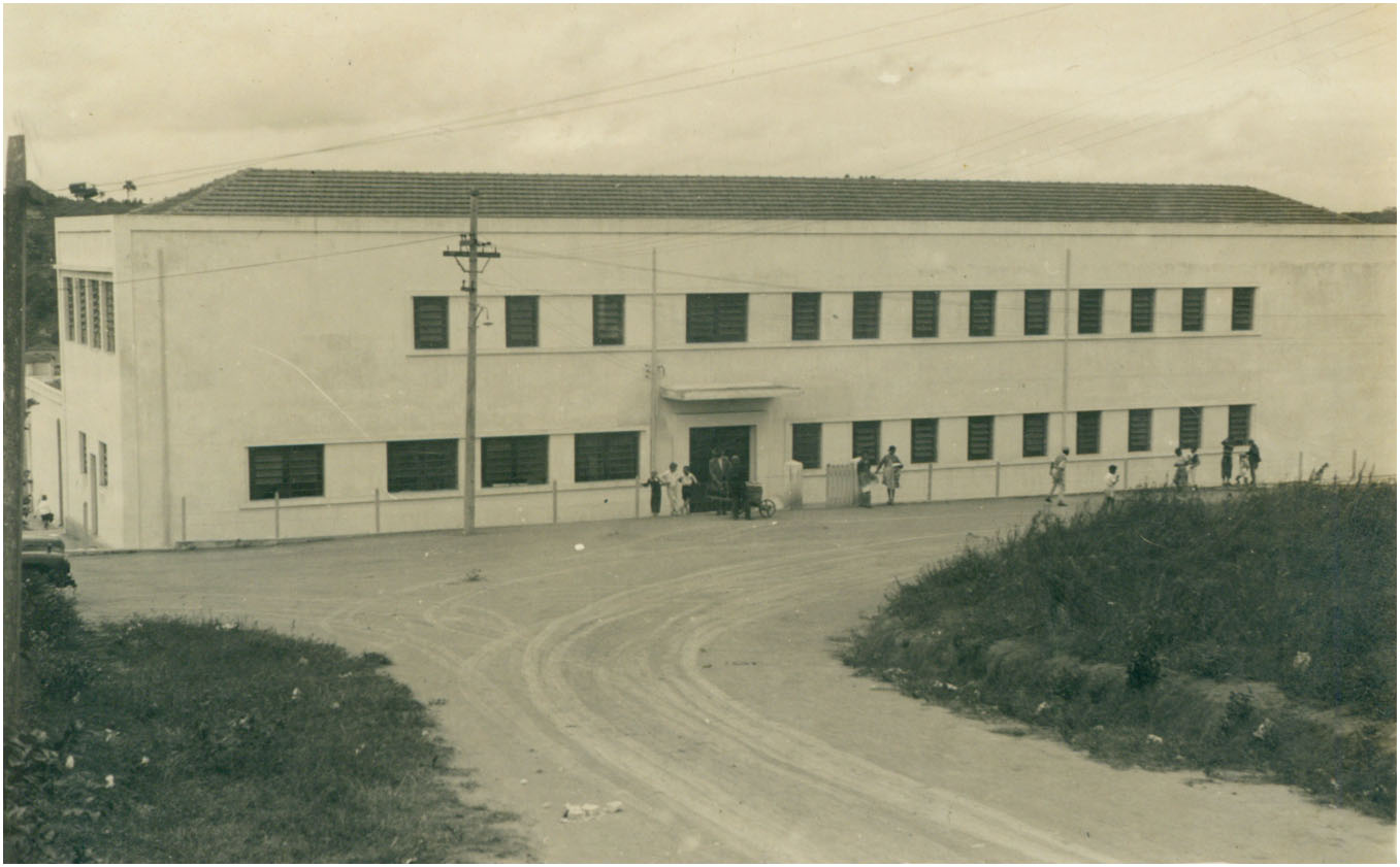 E. E. Prof. Edir do Couto Rosa; E. E. Professor Edir do Couto Rosa; Escola Estadual Prof. Edir do Couto Rosa; Escola Estadual Professor Edir do Couto Rosa; Grupo Escolar Prof. Edir do Couto Rosa; Grupo Escolar Professor Edir do Couto Rosa